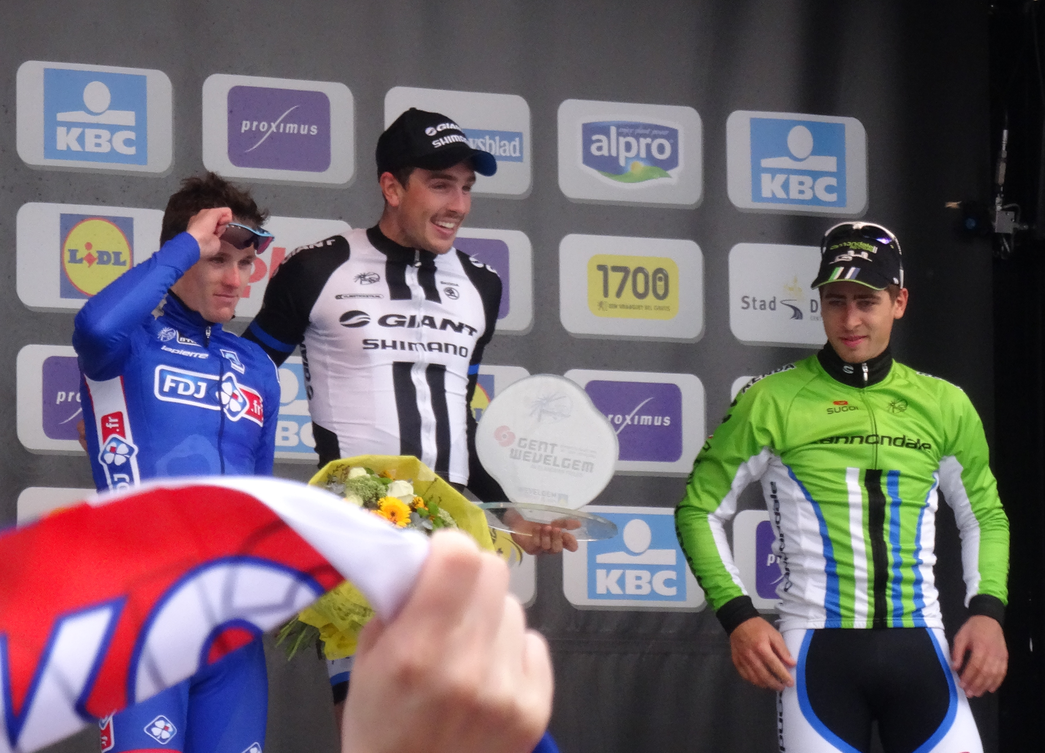 Reportage photographique réalisé le dimanche 30 mars à l'occasion de l'arrivée de Gand-Wevelgem 2014 à Wevelgem, Belgique.